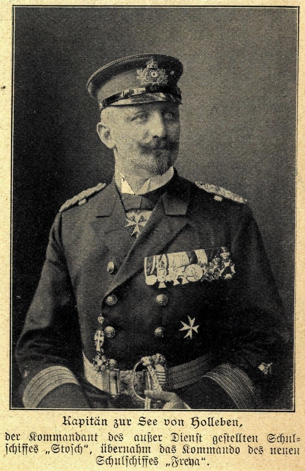 Kapitän zur See Franz von Holleben übernimmt neues Kommando auf Schulschiff "Freya", 1907